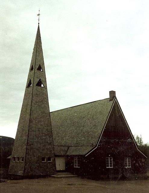 Tana